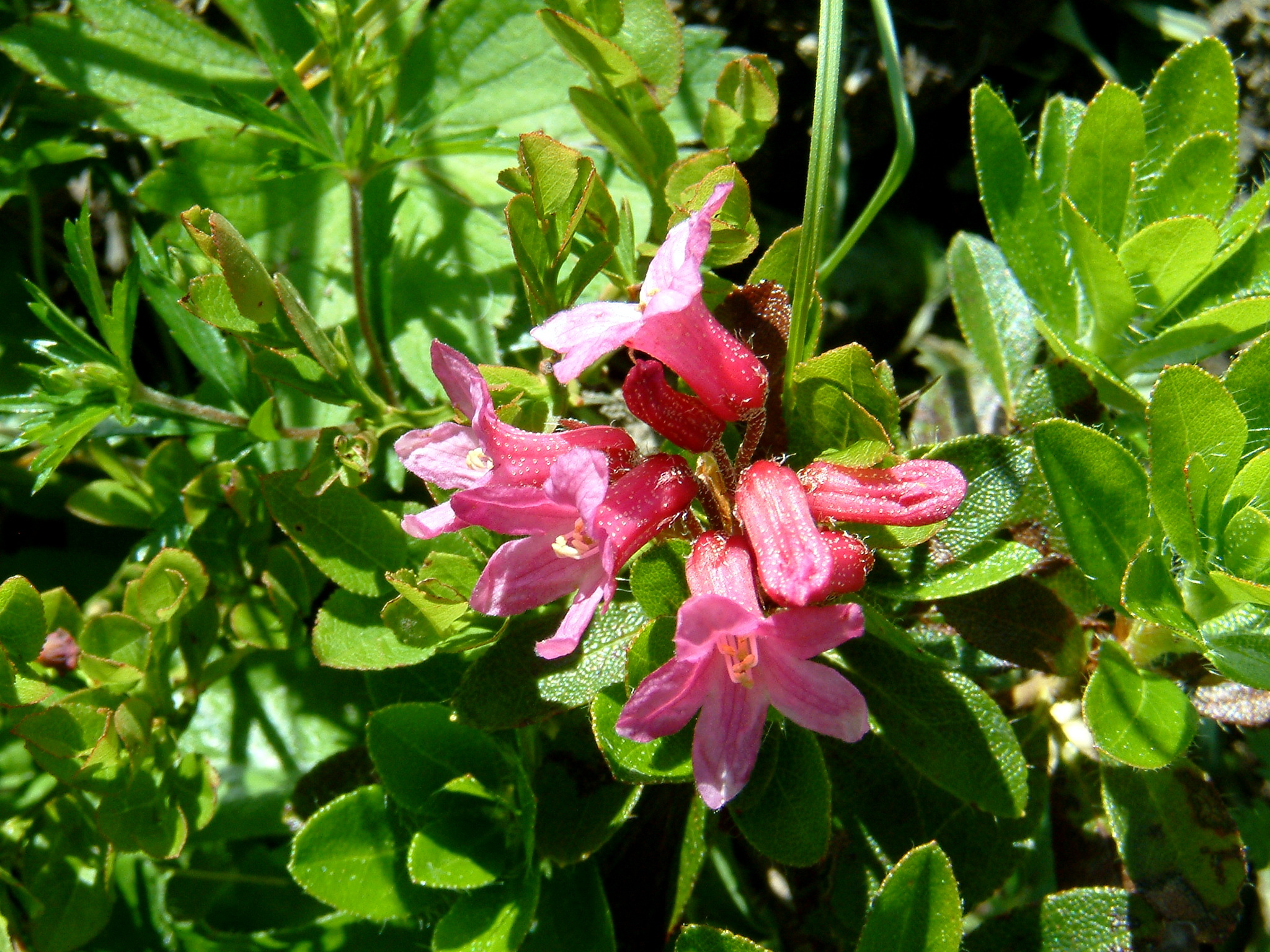 Dachstein in den Gemeinden Gosau, Hallstatt und Obertraun: Alpenrose nahe der Zwieselalm (Gosau) This media shows the nature reserve in Upper Austria with the ID n098.